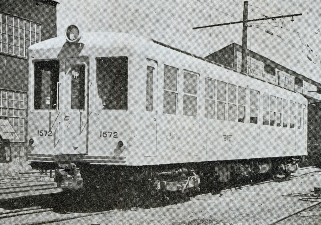 帝都高速度交通営団（営団地下鉄）銀座線の1500形電車。